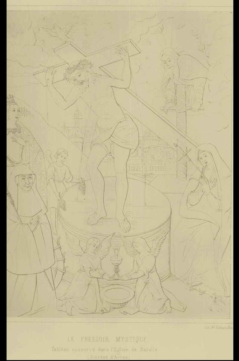 Tableau de l'Eglise de Baralle du Pressoir Mystique